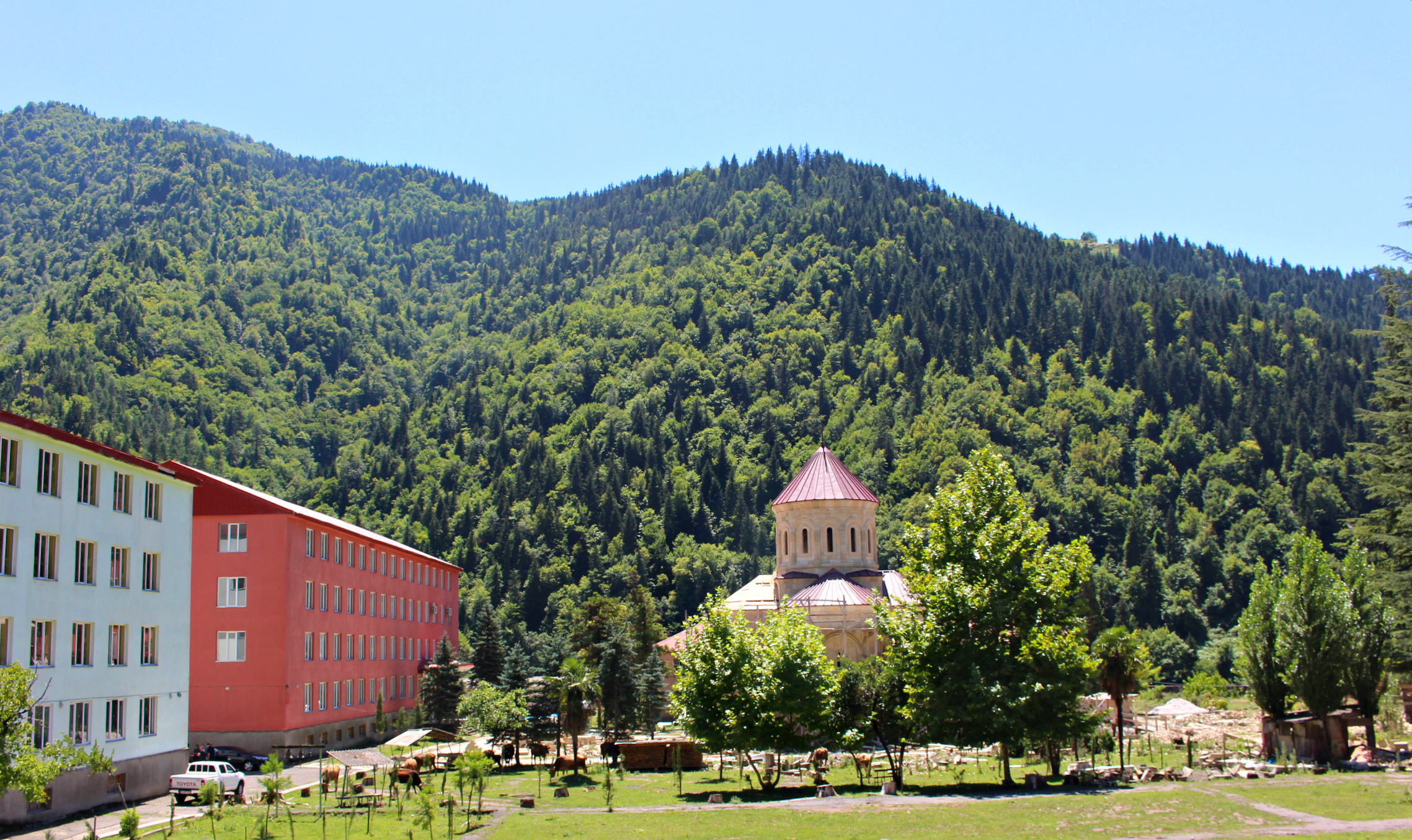 საქართველოს საპატრიარქოს წმიდა ტბელ აბუსერისძის სახელობის სასწავლო უნივერსიტეტი — მრავალპროფილიანი უმაღლესი სასწავლებელი. მისი დამფუძნებელია საქართველოს სამოციქულო ავტოკეფალური მართლმადიდებელი ეკლესია.